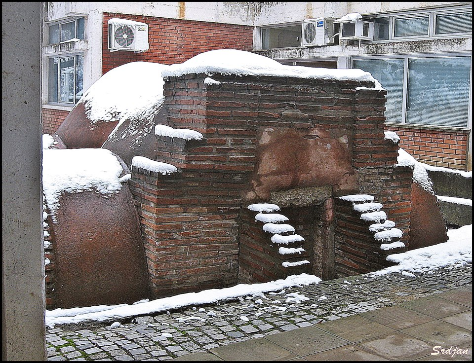 Српски (ћирилица): Niška Banja, касноантичка гробница, највероватније из 5. или 6. века.